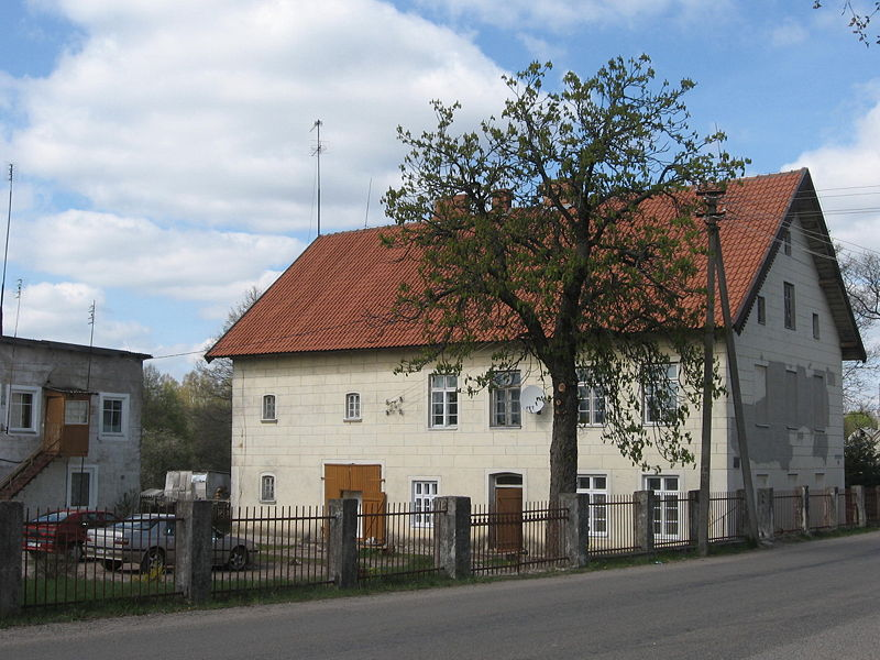 Zudermano gimtinė. Macikų kaimas